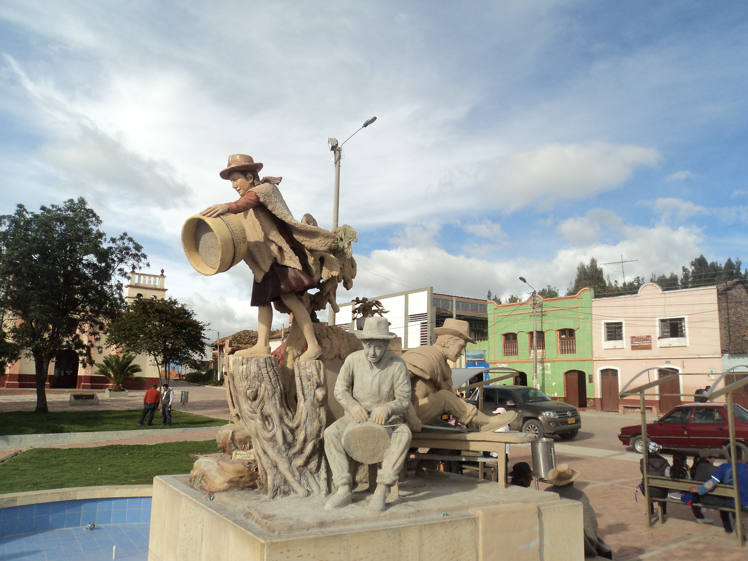 Parque principal de Tota